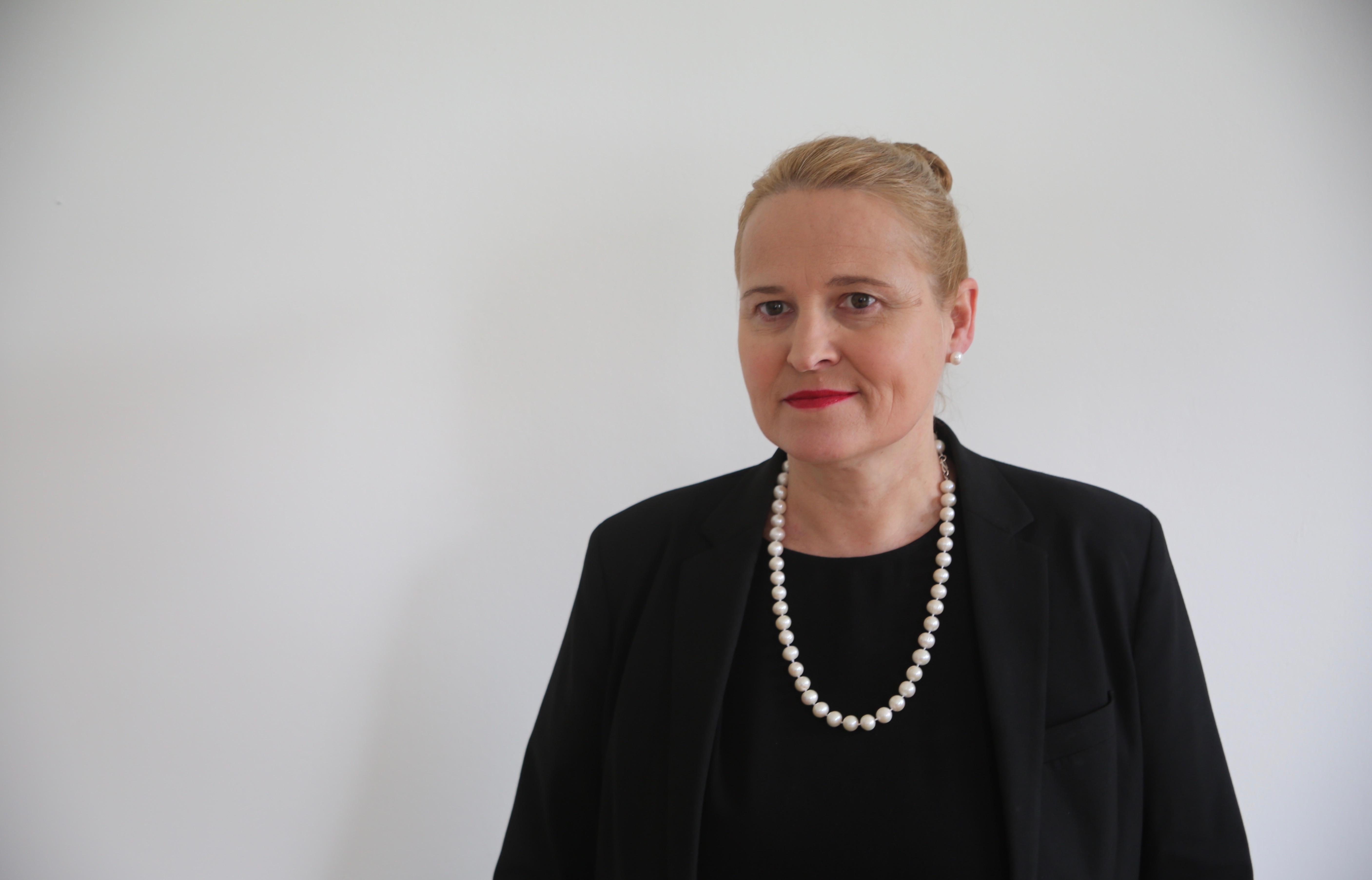 ® Ulrike E. Auga 2018